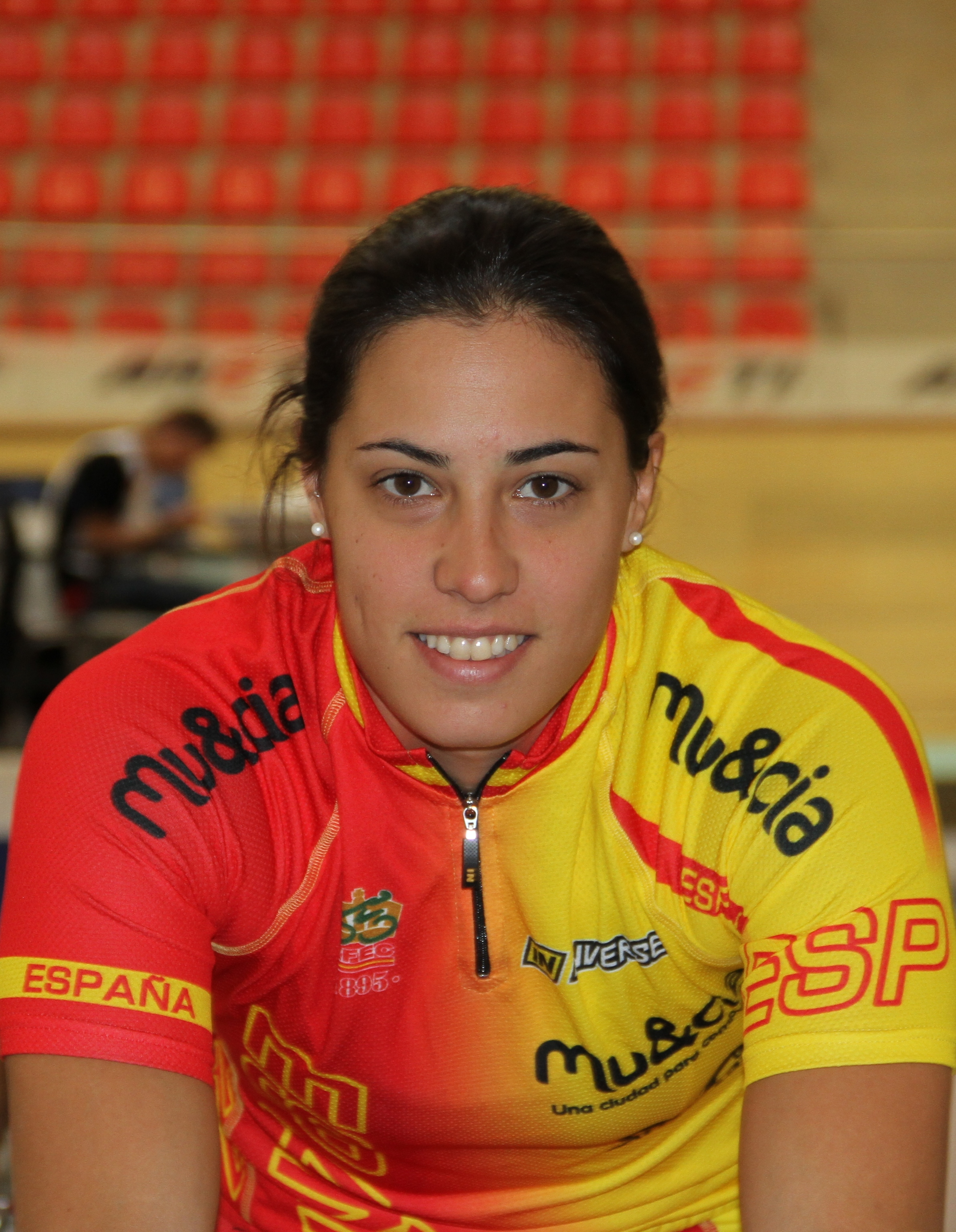 Tania Calvo, spanische Radsportlerin The making of this document was supported by the Community-Budget of Wikimedia Germany.